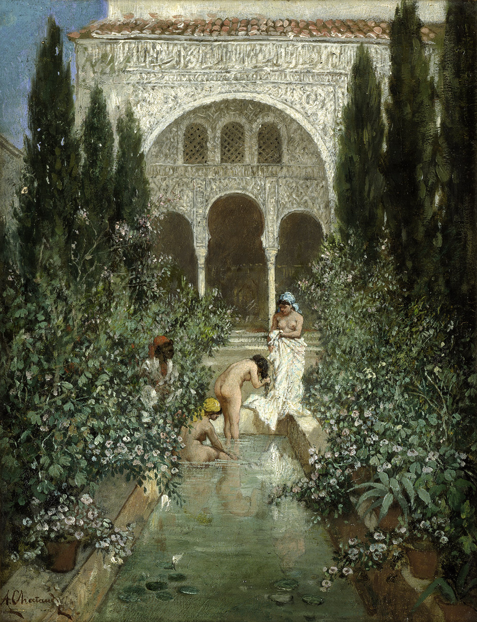 Marc Alfred Chataud (1833–1908): Drei Frauen beim Bade im Garten eines Serail. Öl auf Leinwand. 24,6 x 19,2 cm. Unten links signiert "A. Chataud".